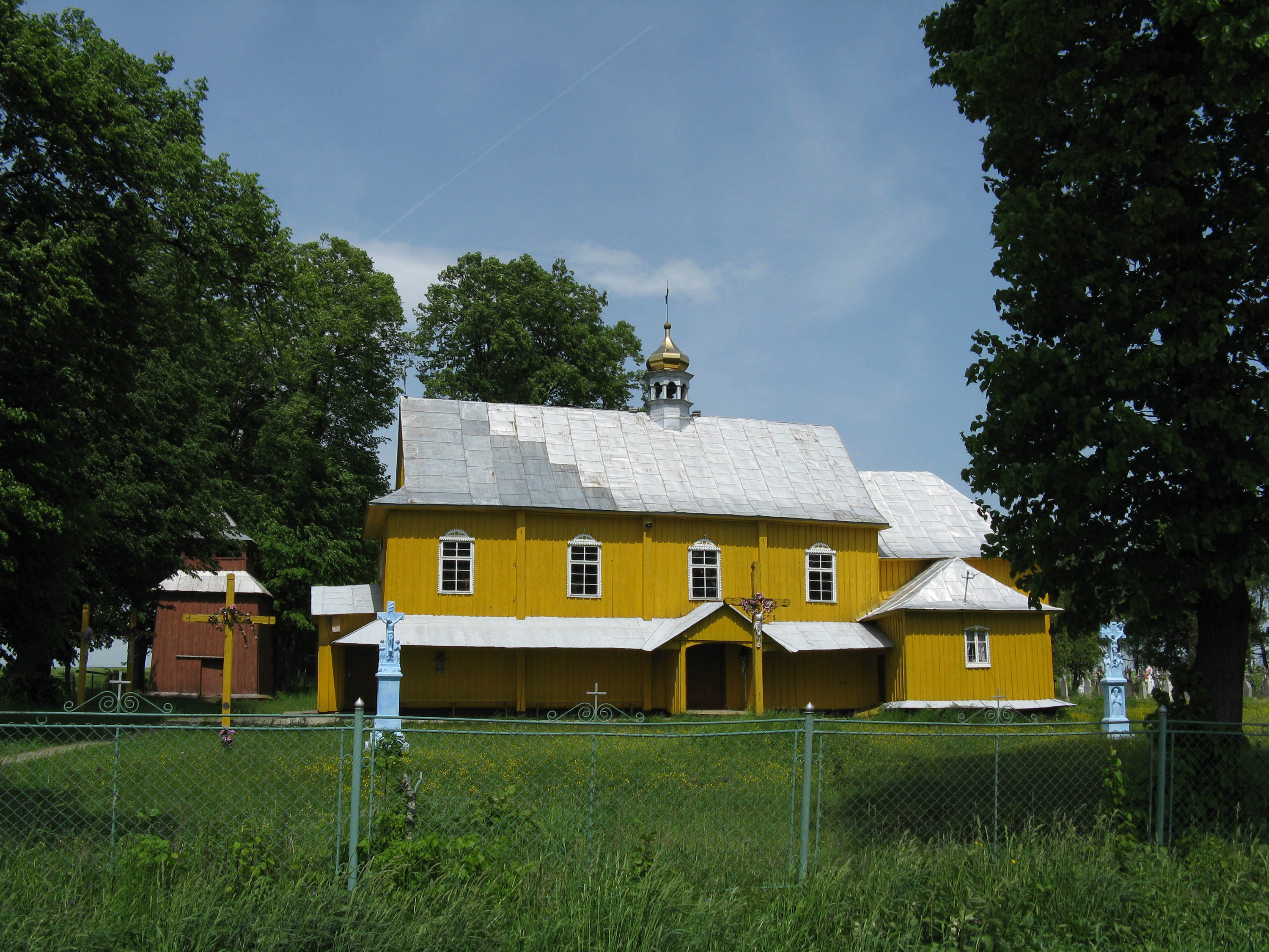 Дерев'яні церква і дзвіниця с. Воля Якубова Дрогобицького району